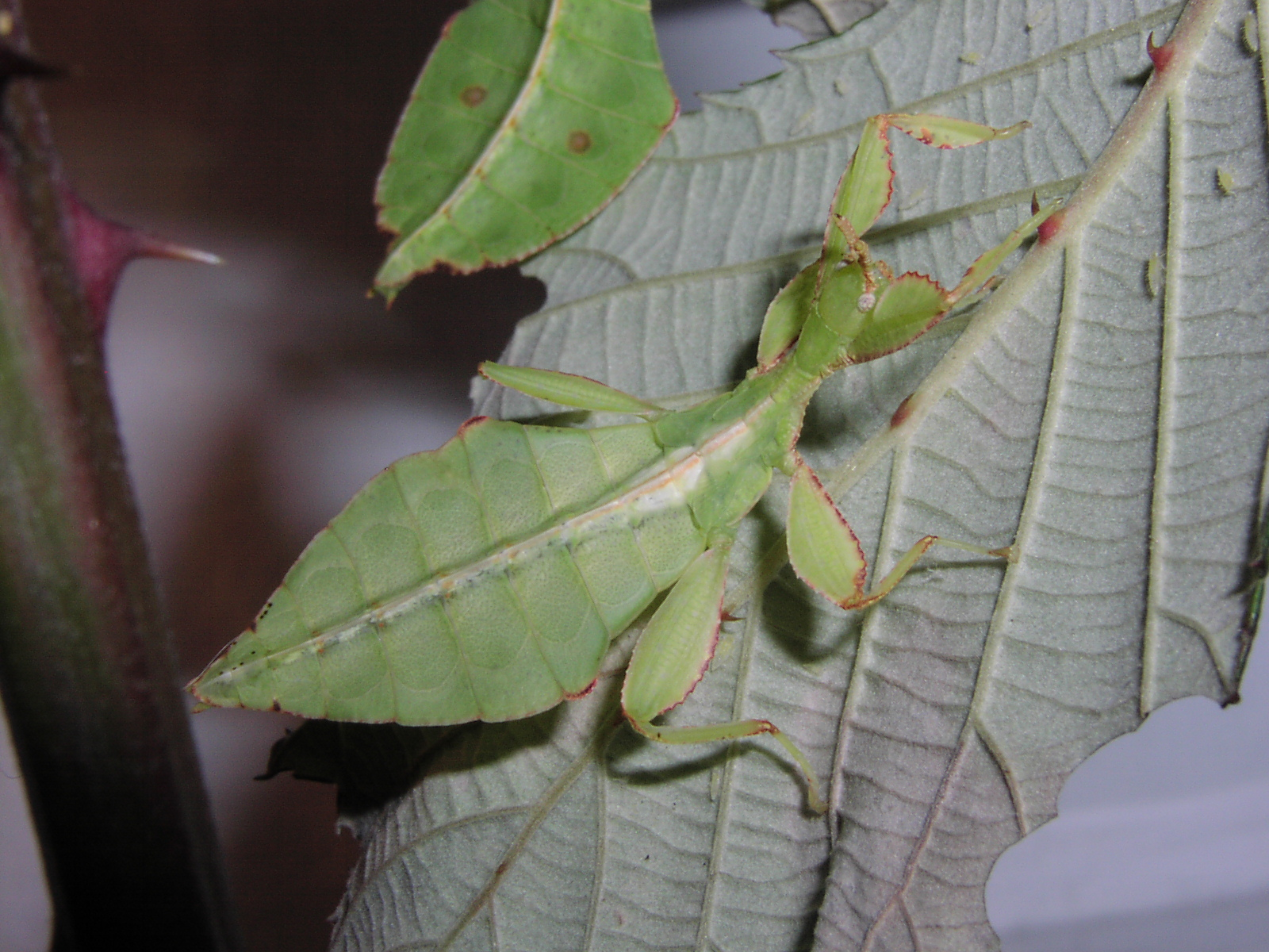 Wandelndes Blatt (wahrscheinlich Phyllium celebicum); Männchen, Larvenstadium L2. Oben ist noch ein Teil des Körpers eines weiblichen Tieres gleicher Art sichtbar. An den Blättern sind typische Fraß-spuren erkennbar.